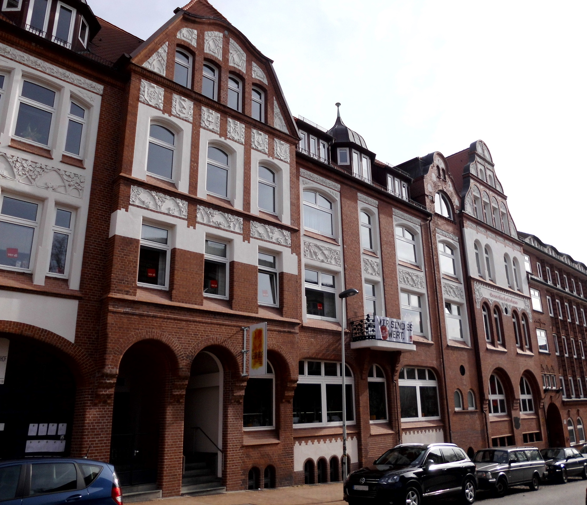 Legienstraße 22-24 im Kieler Stadtteil Damperhof.